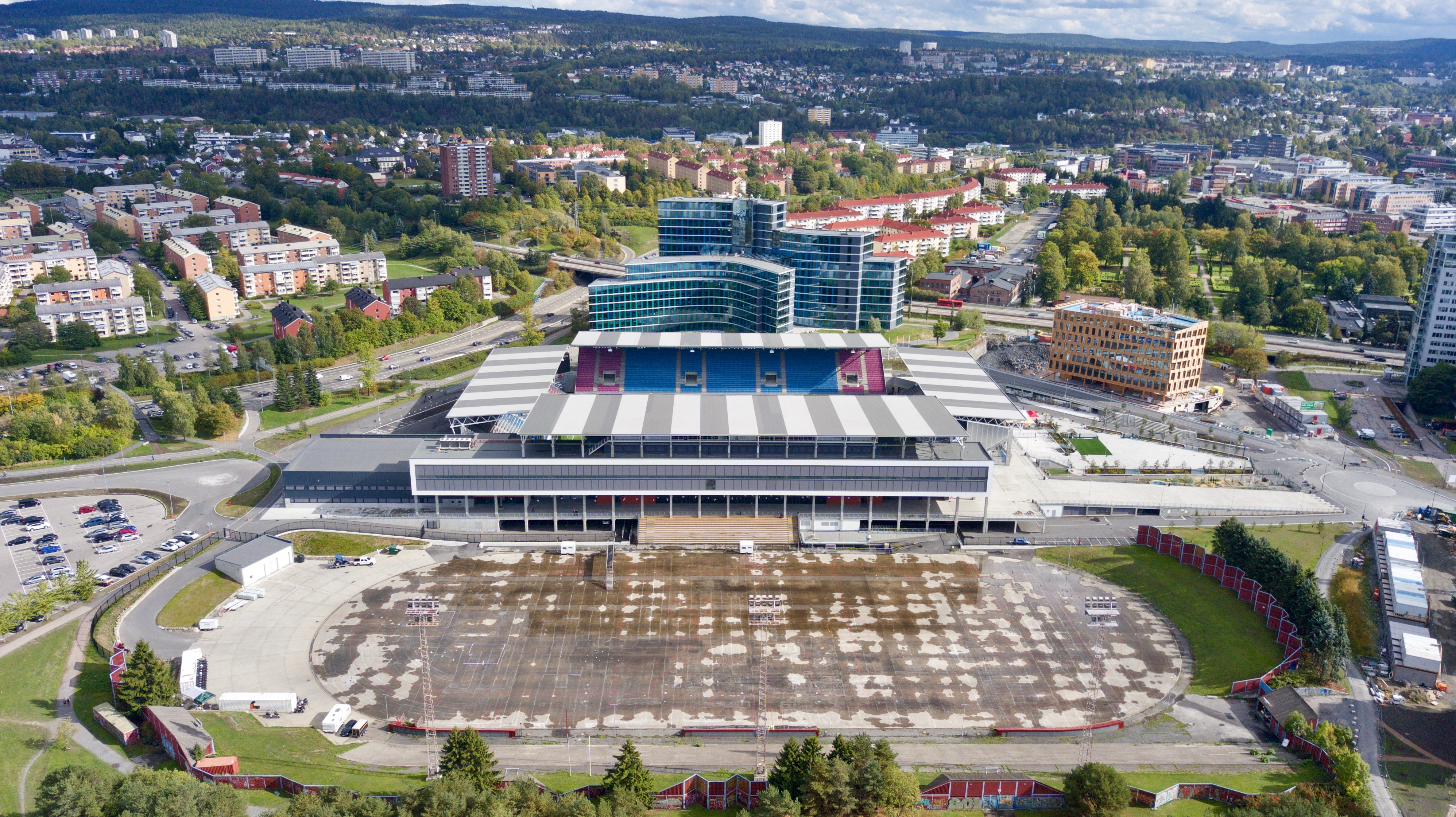 Intility Arena (Vålerenga Stadion) og Valle Hovin, Oslo.